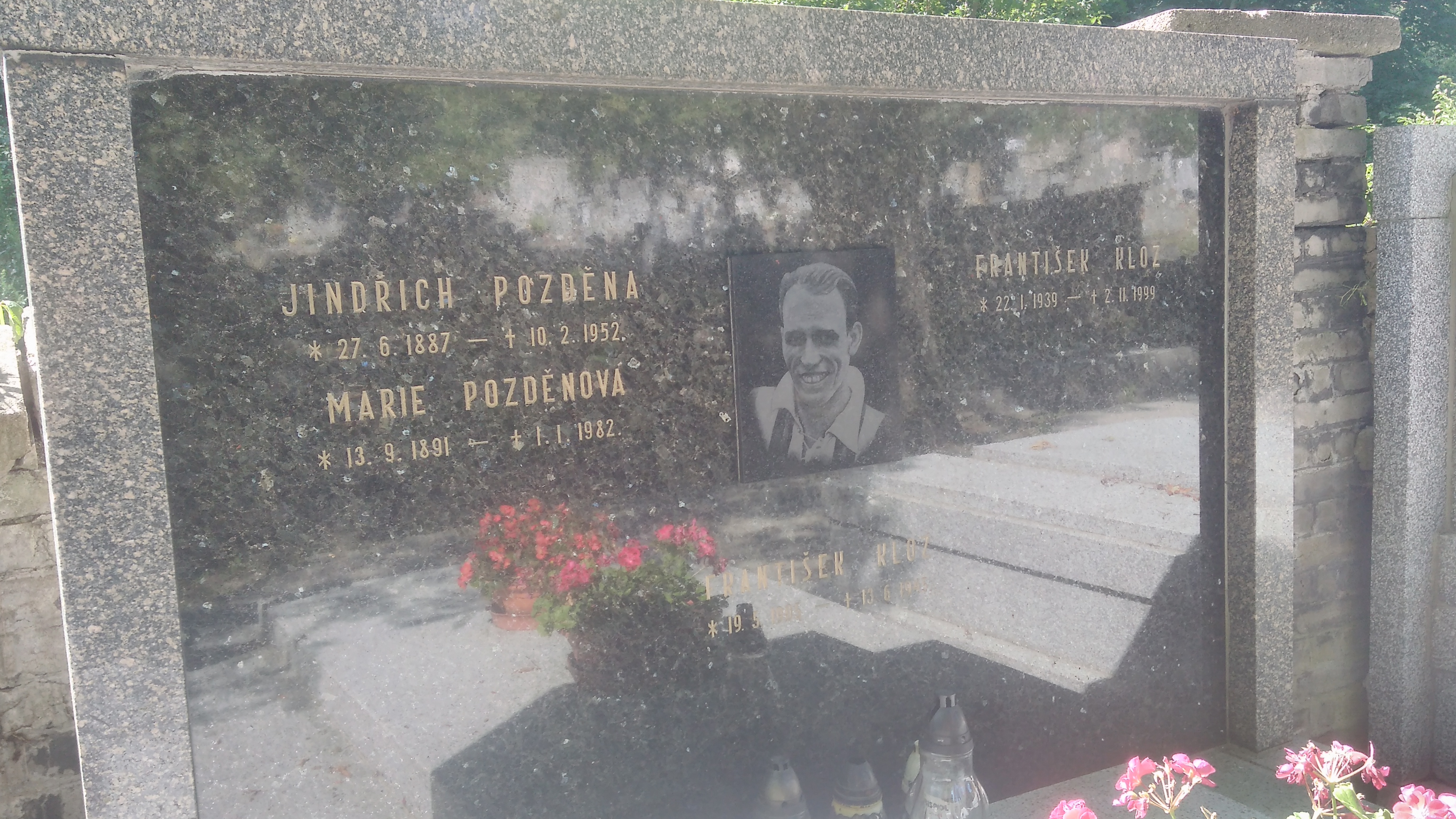 náhrobek